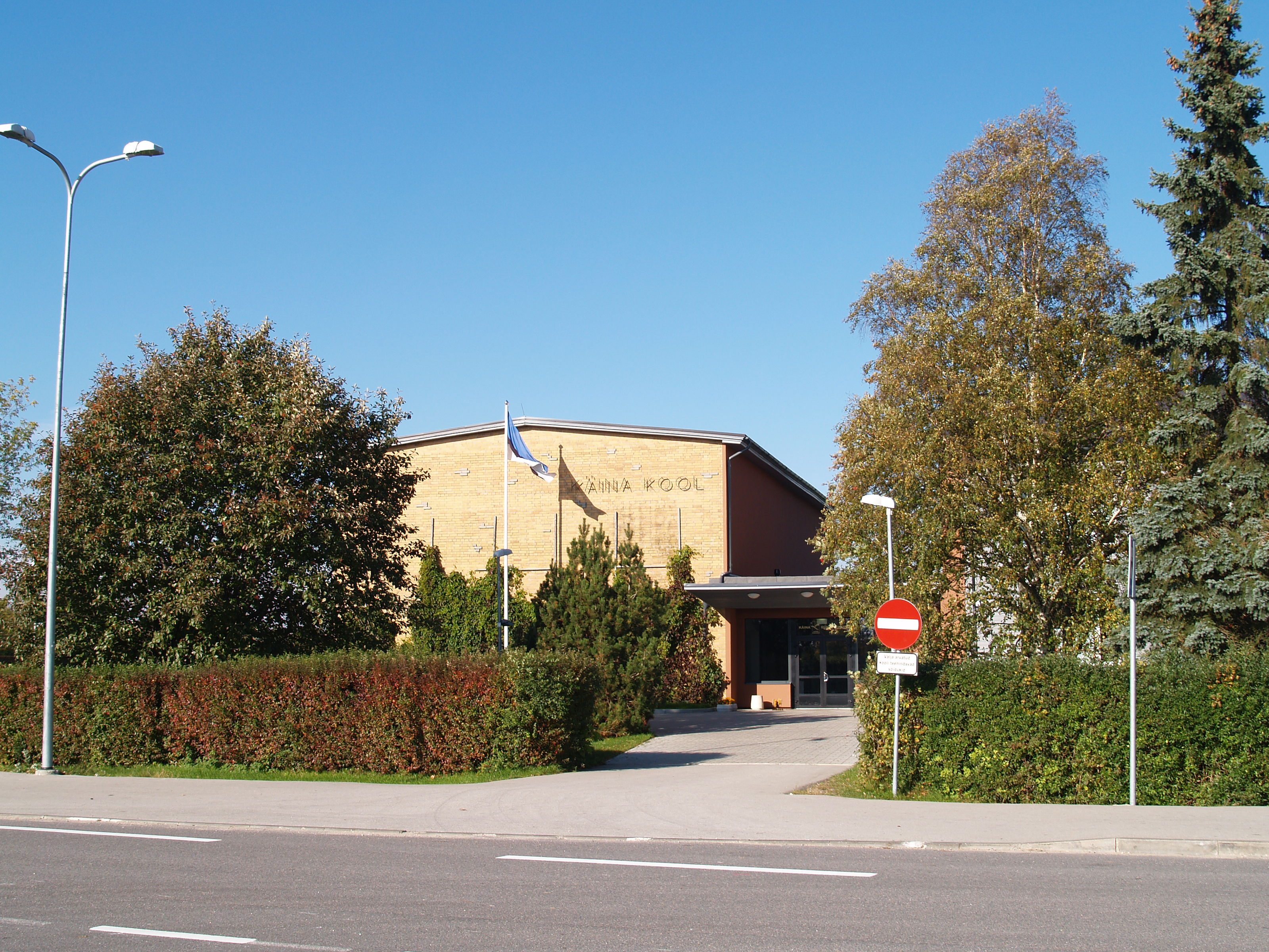 Käina Gümnaasium